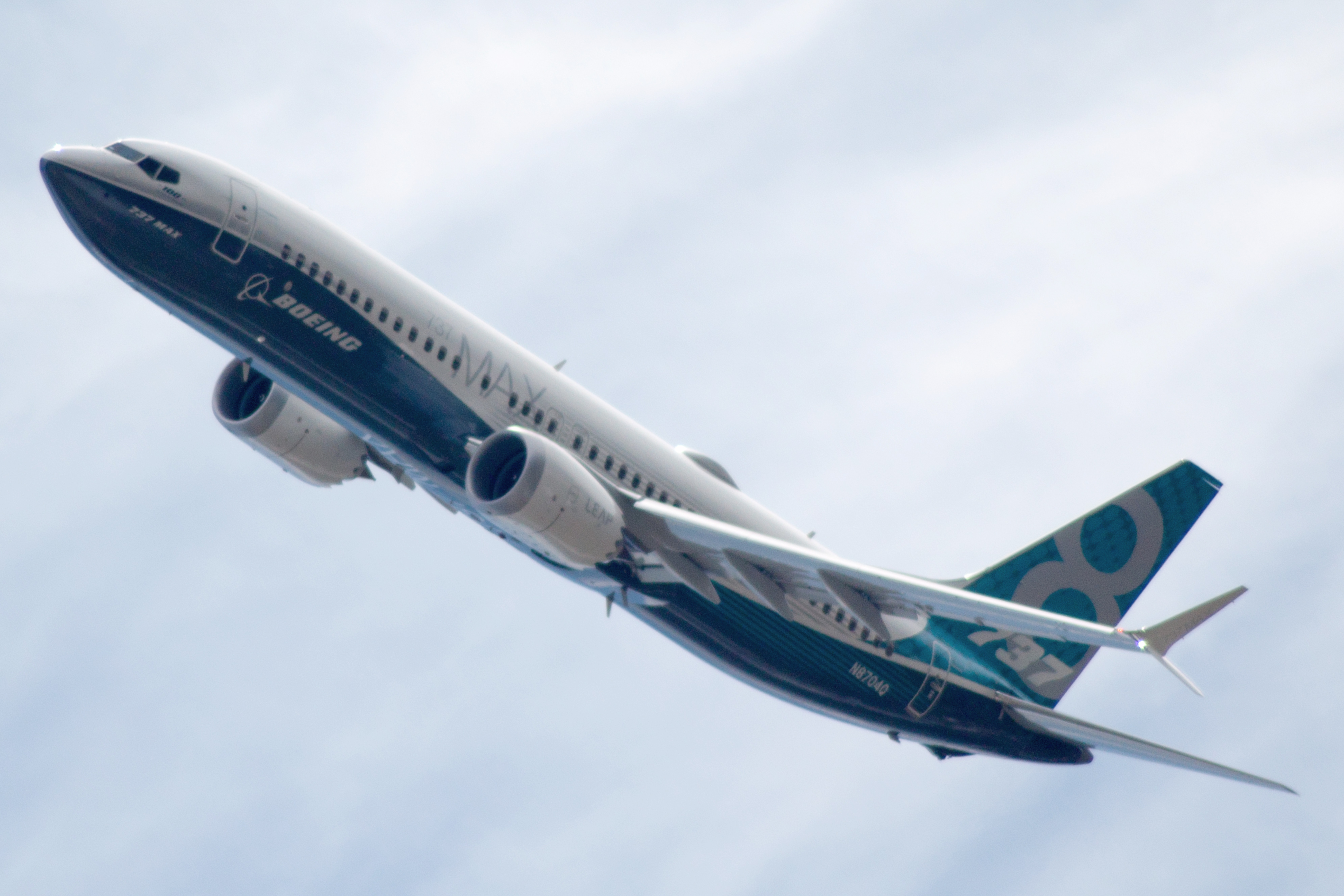 Boeing 737-8 MAX N8704Q at Farnborough Airshow 2016